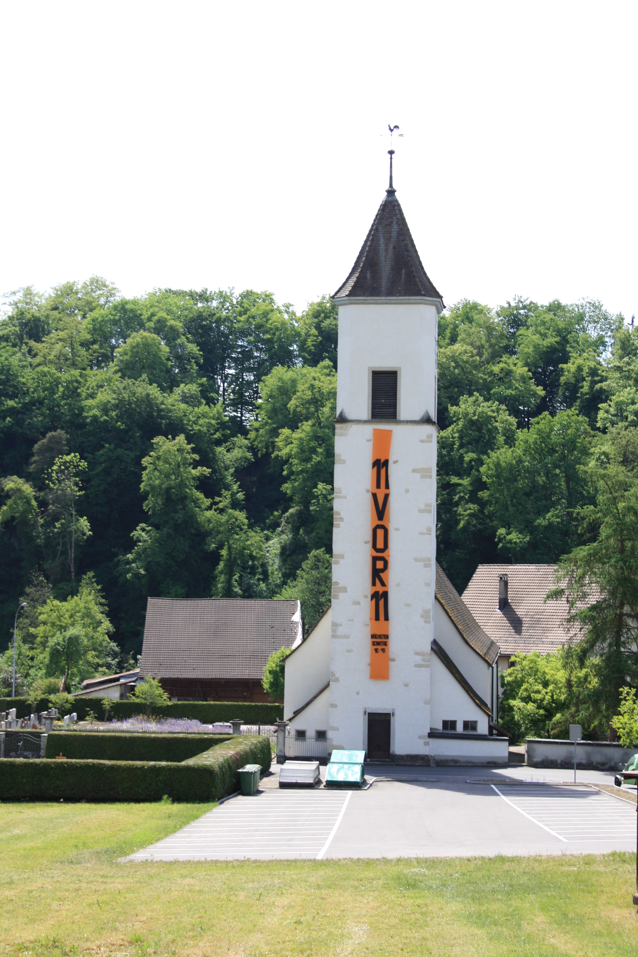 Reformierte Kirche Tegerfelden mit Werbebanner für den 11vor11-Gottesdienst